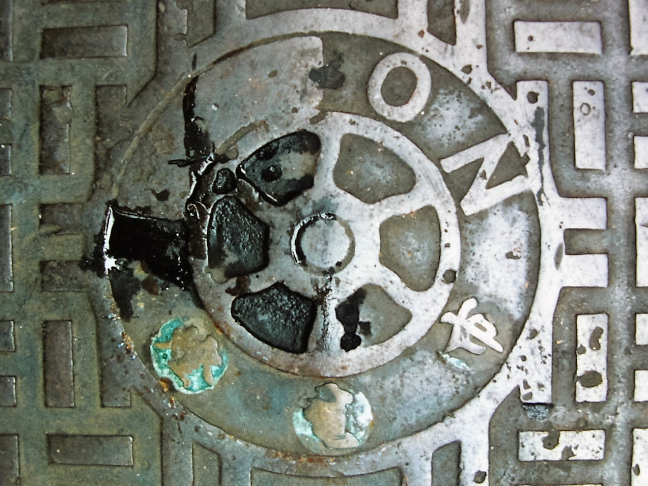 東京市電気局マンホール蓋 戦前製